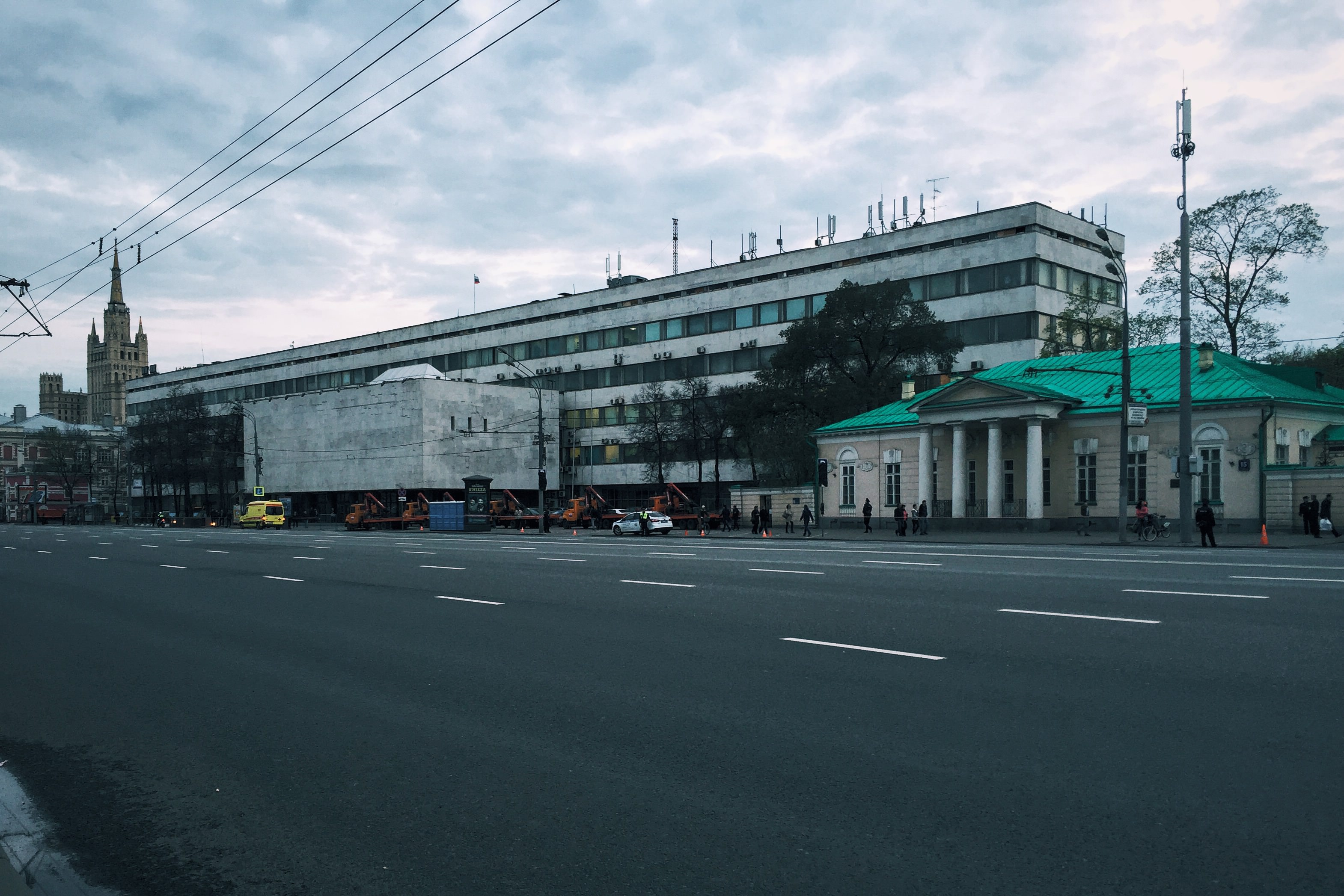 Садовая-Кудринская, 11 - Федеральная антимонопольная служба. До того Минсудпром СССР, а в основе здания - довоенный "Институт генетики", спроектированный Пантелеймоном Голосовым. Но осталась от него, должно быть, только планировка участка...